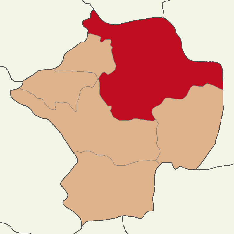 Niğde Merkez ilçesinin konumu